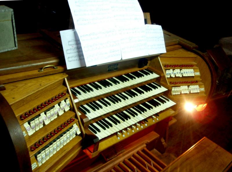 Consola del órgano Amezua de la Catedral de Valladolid, construido en dos fases en 1904 y 1933. Se aprecian los tres teclados manuales y parte del pedalero así como las plaquetas a los lados, que accionan los diferentes registros de los que consta este órgano